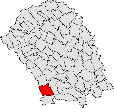 Categorie:Hărţi ale judeţului Botoşani